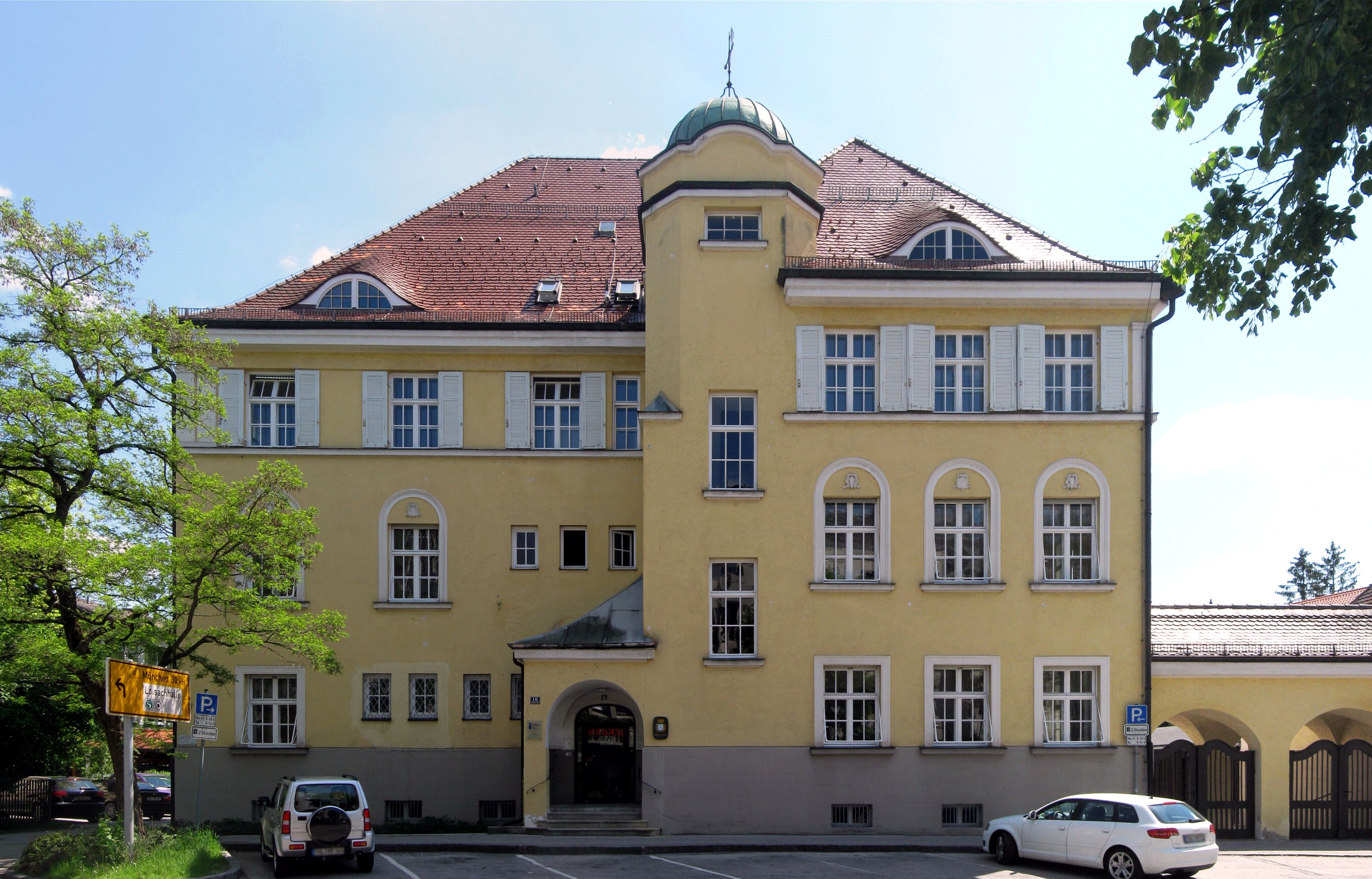 Sauerlacher Straße 16; Finanzamt, dreigeschossiger Walmdachbau mit Treppenturm, modernhistorisierend, erbaut 1903.